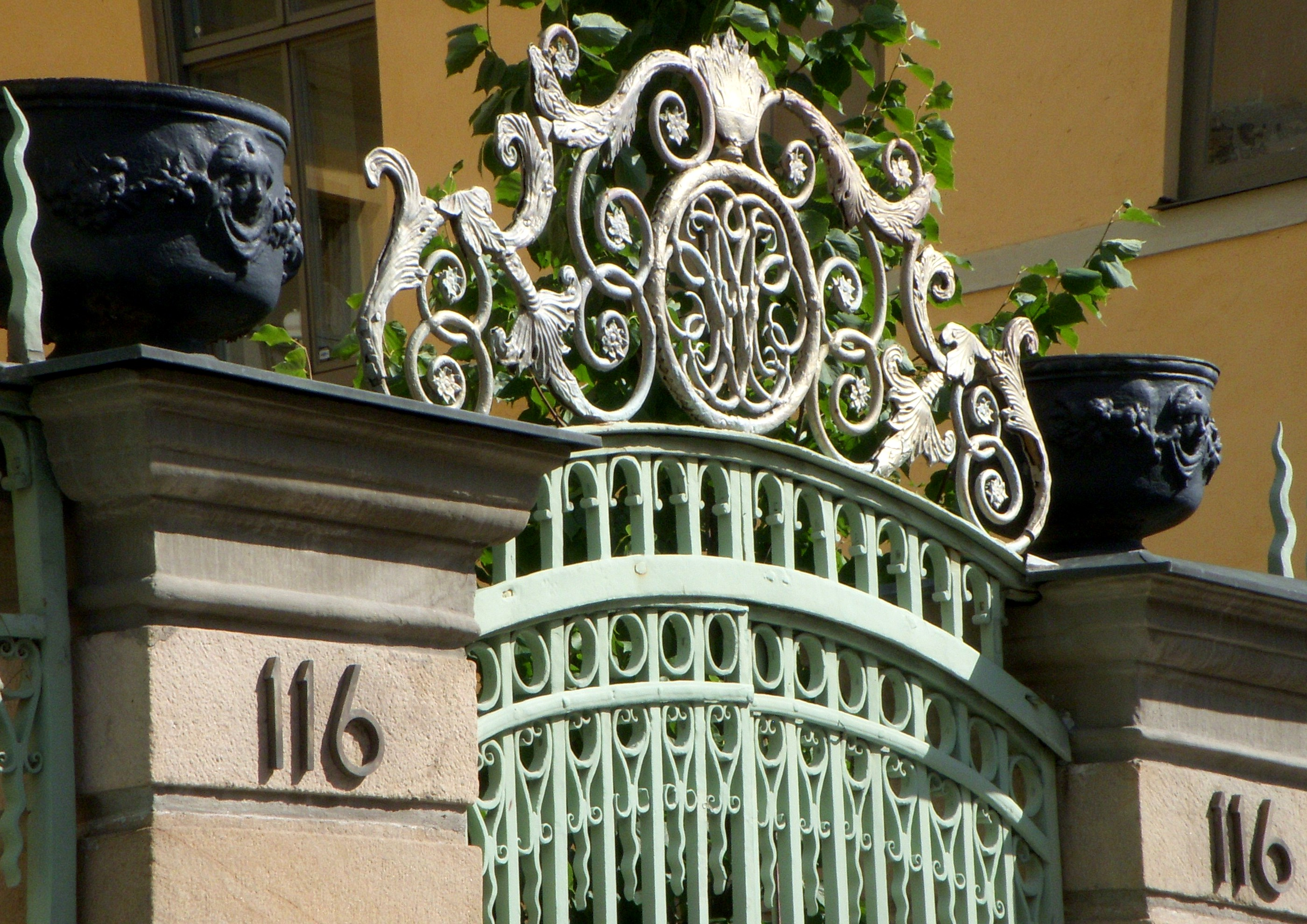 Schefflerska palatset initialer över portalen